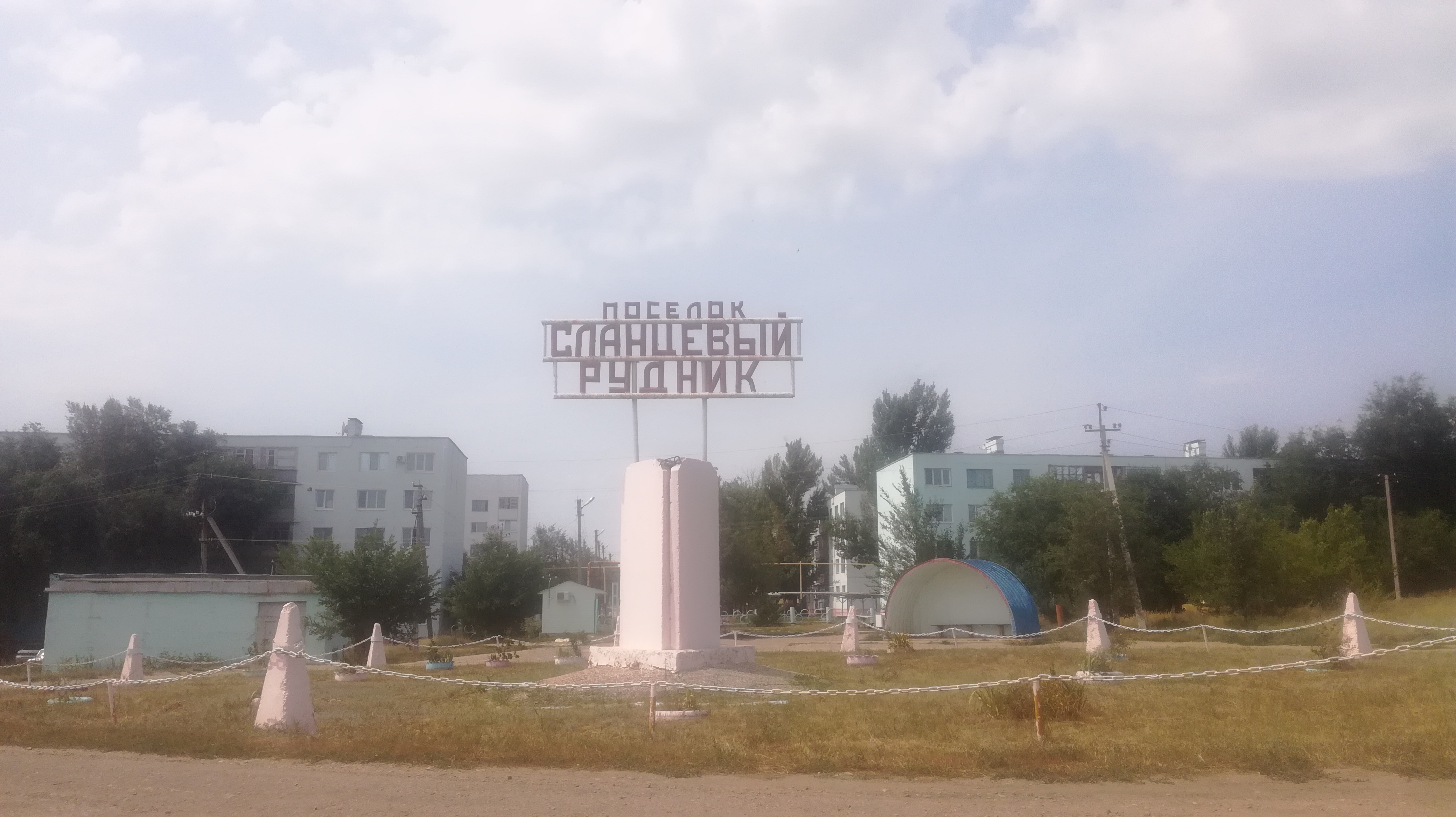 Стела на въезде в поселок